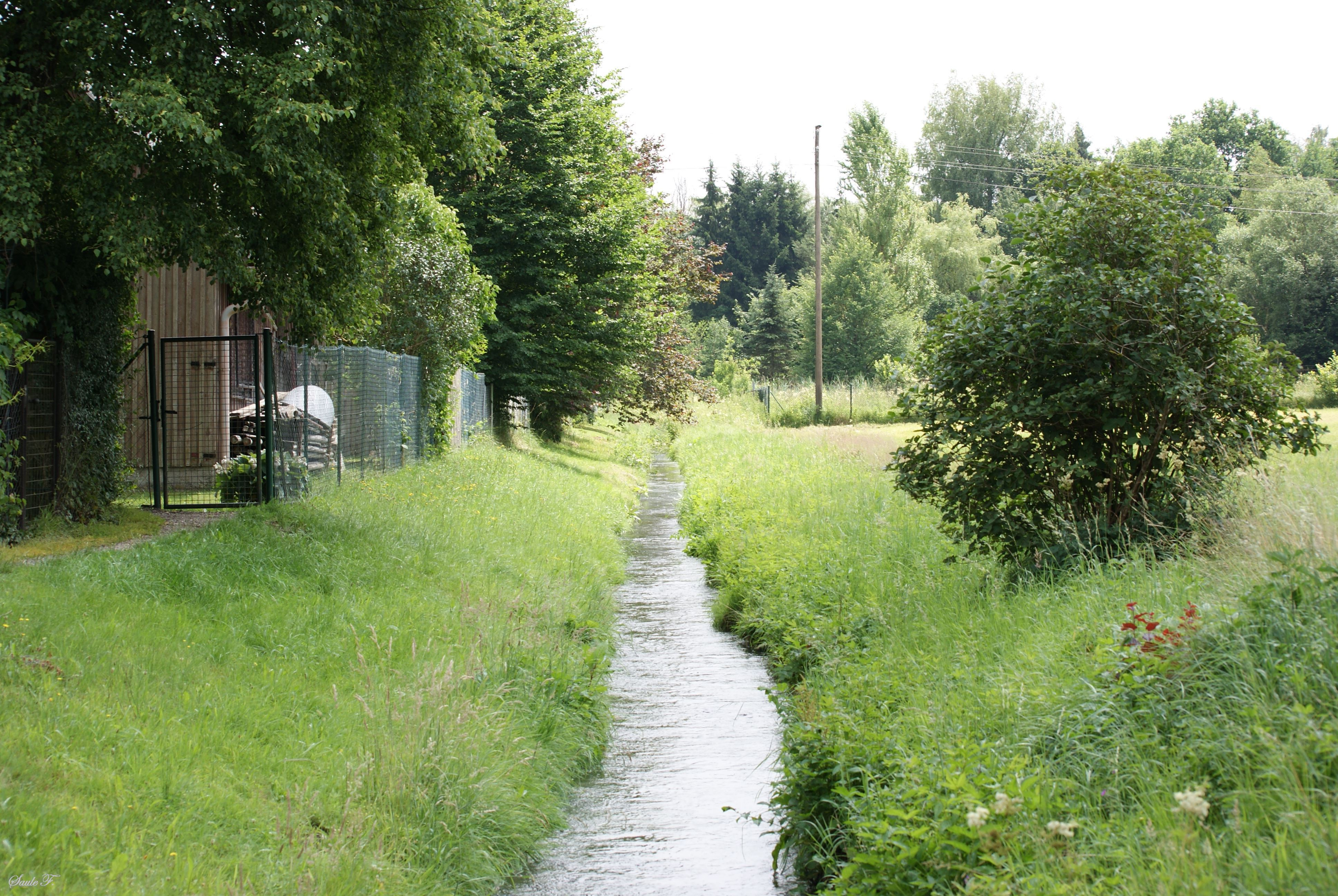 Blick von der Gartenstraße Richtung südlichen Ortsrand